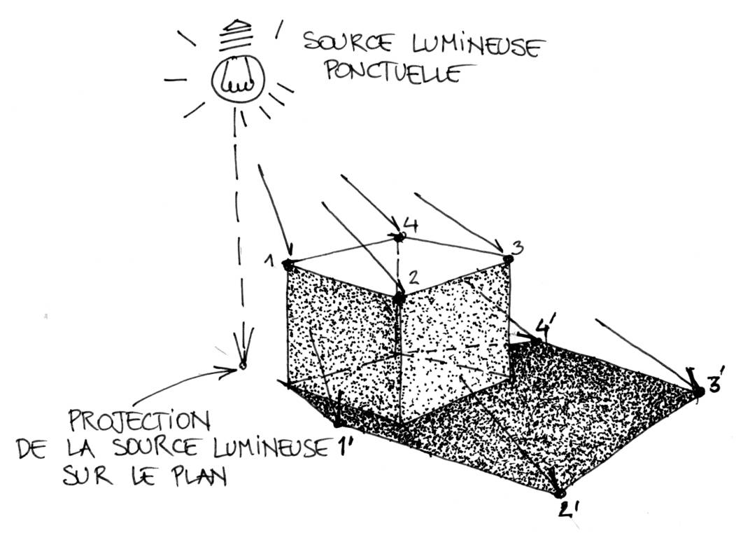 ombre, source lumineuse ponctuelle